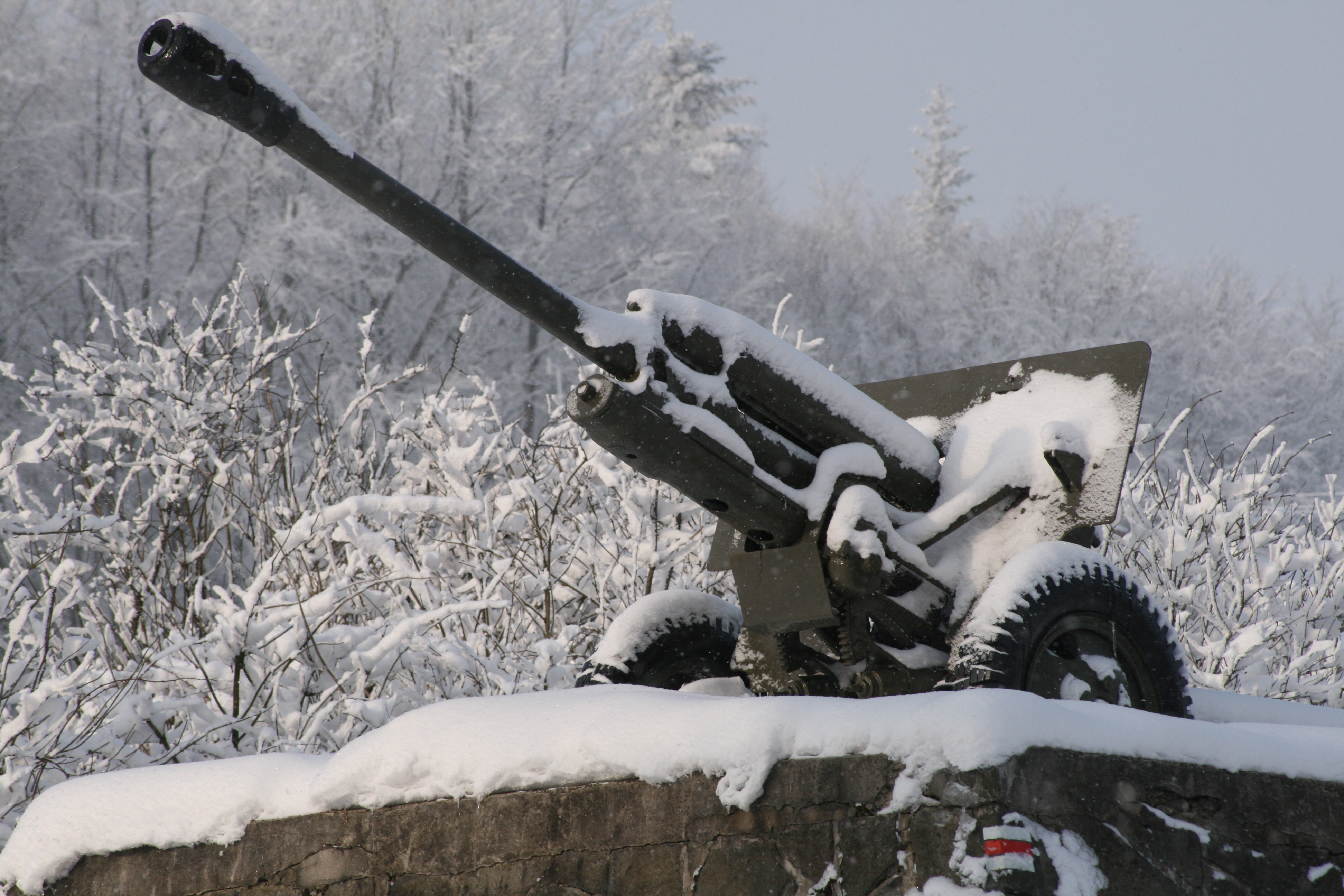 Sovietsky divizný 76 mm protitankový kanón bol vo výzbroji 1. česko-slovenského armádneho zboru v ZSSR